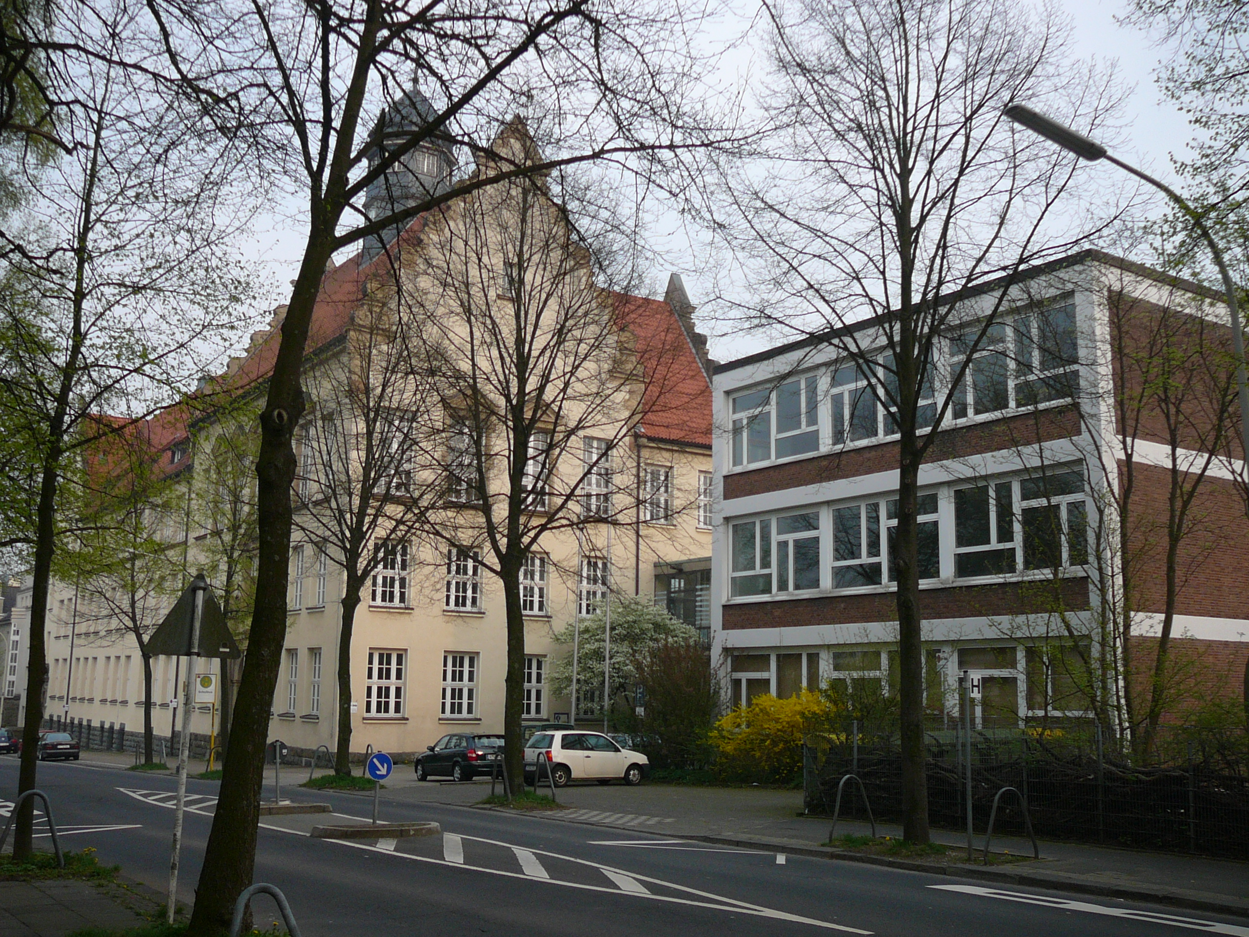 Bayreuther Straße, Wuppertal